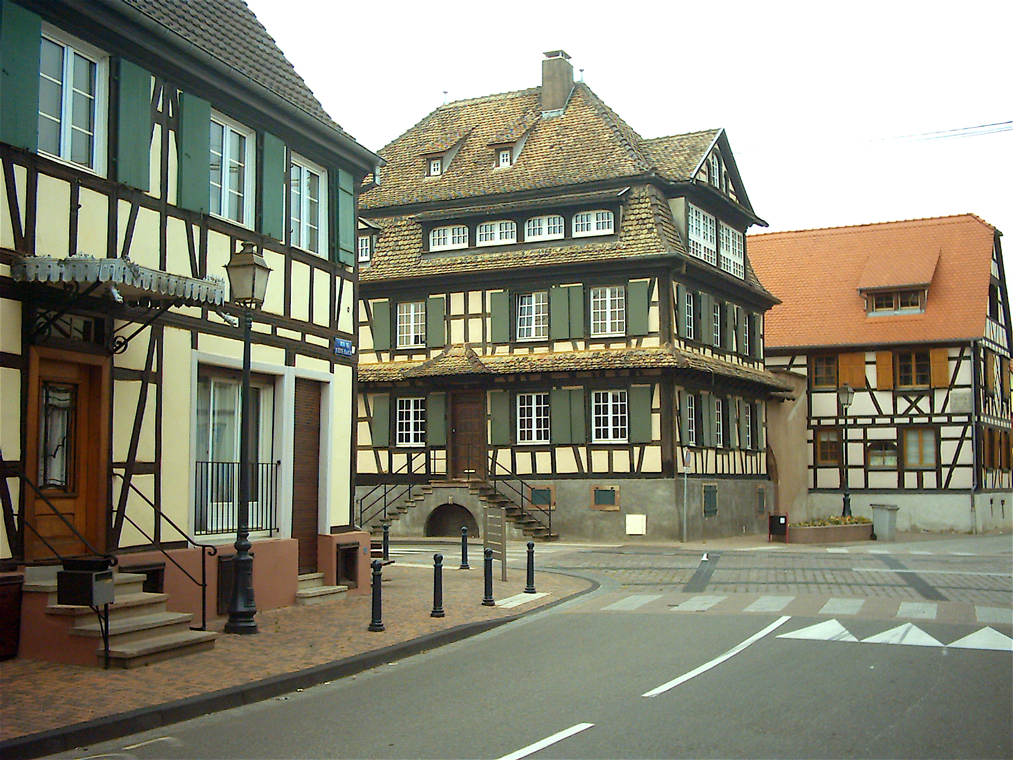 Erstein croisement rue du 28 Novembre; Maisons de tanneurs 24 rue de Strasbourg et, au fond, 1 rue du Moulin